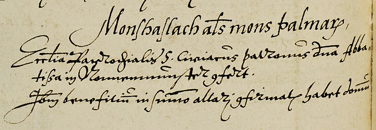 Wormser Synodale 1496 Eintrag Berghaselbach, Palmberg